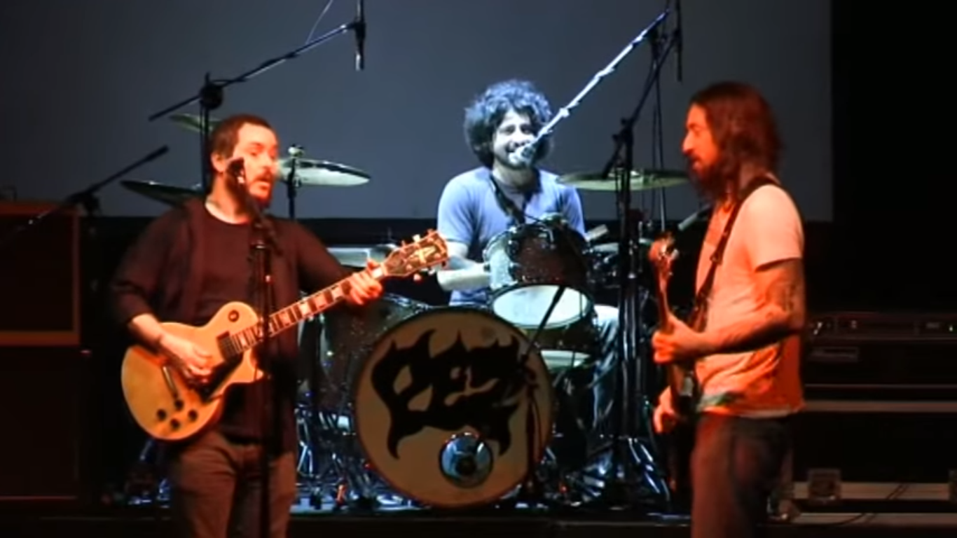 Pez, a rock band from Argentina in 2009